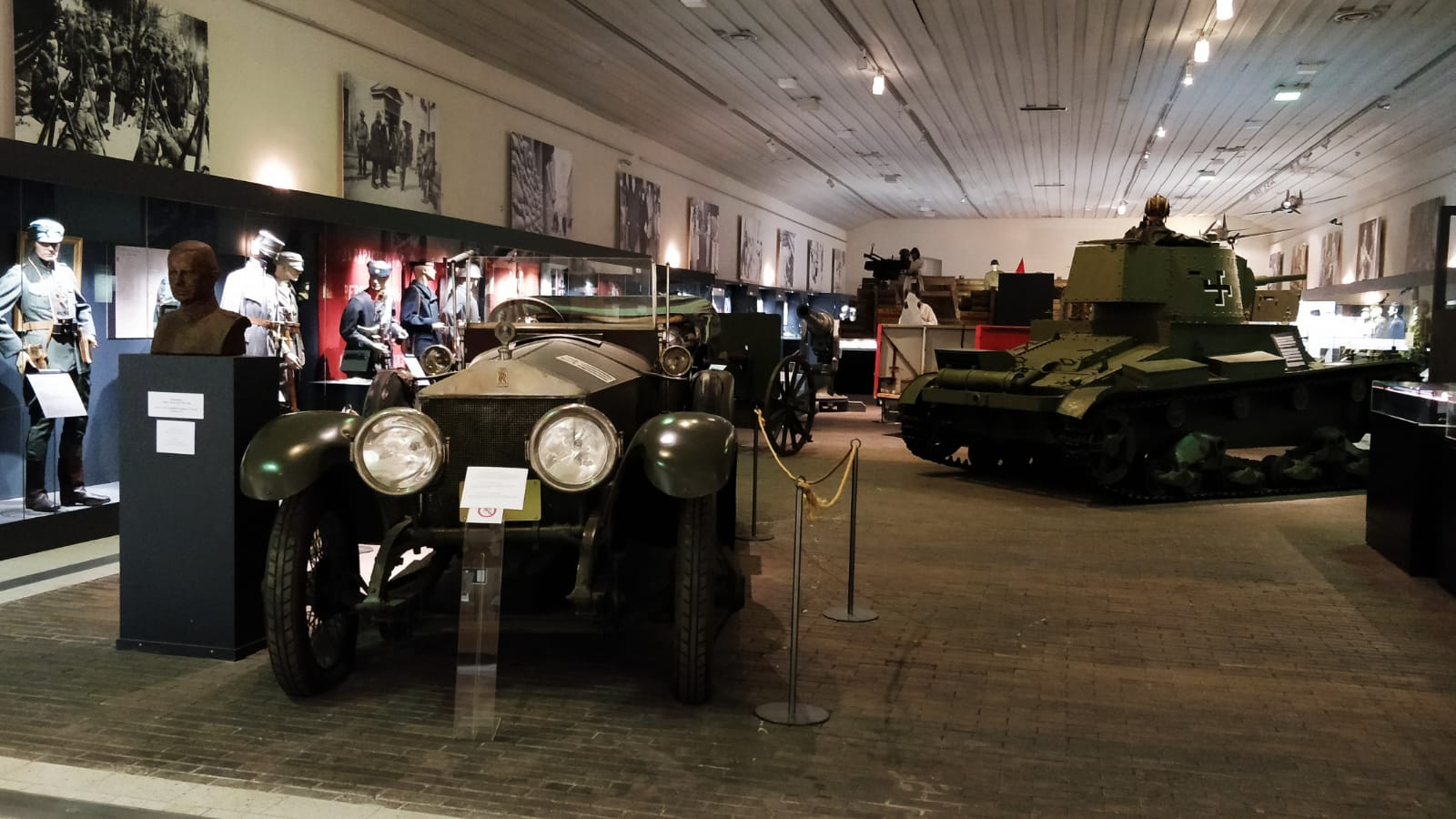 Sotamuseon Maneesi